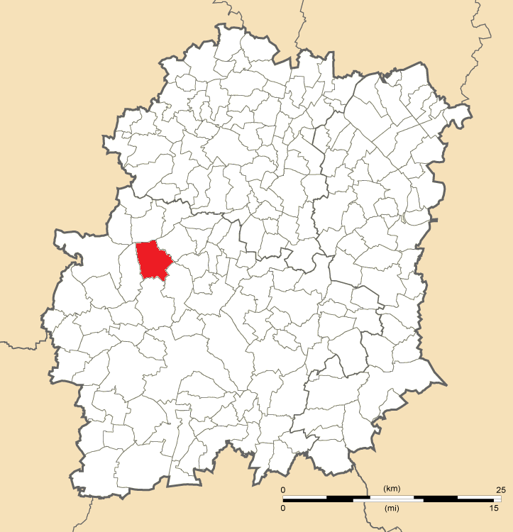 Carte de position de Sermaise en Essonne (91)